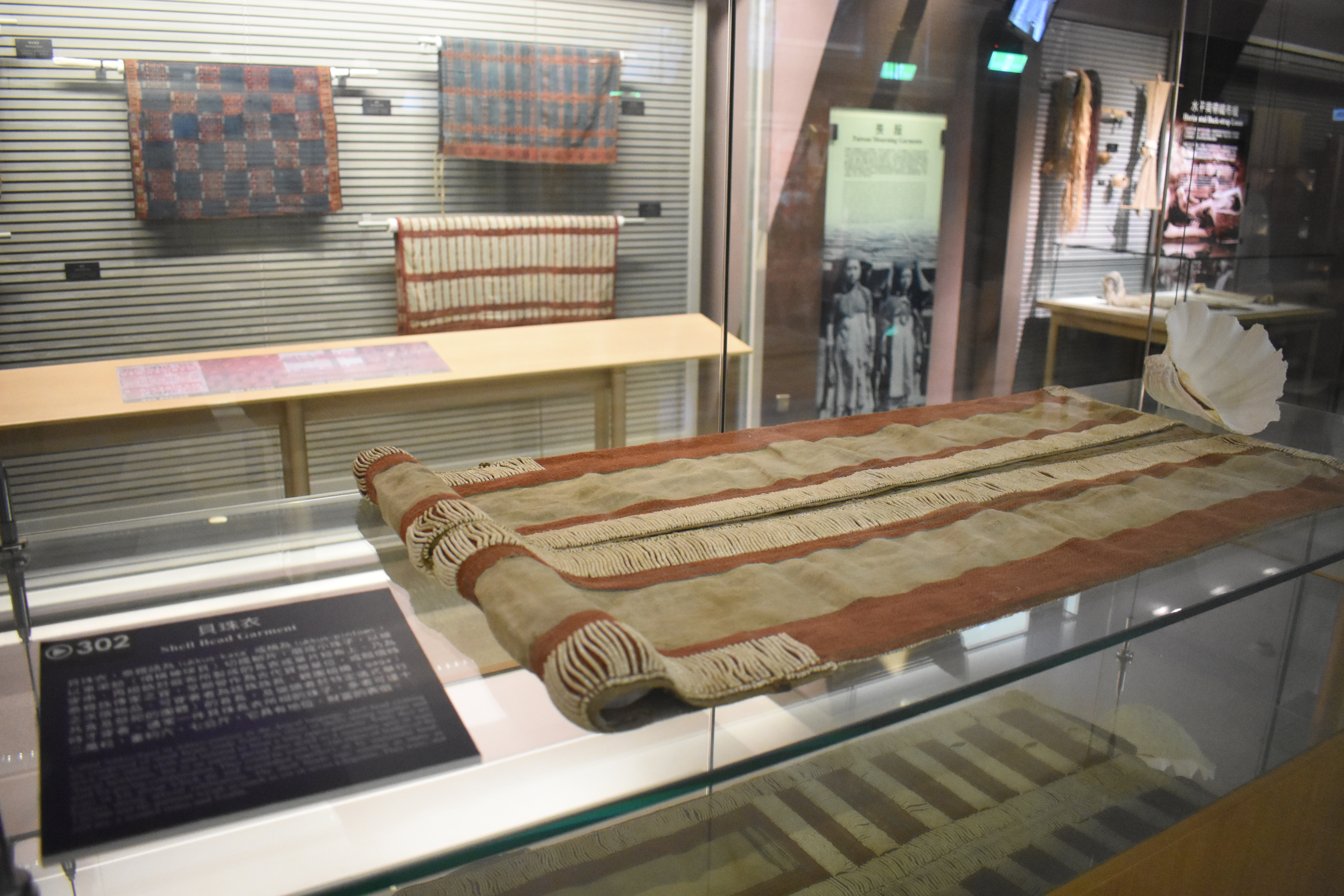 中文（台灣）: 泰雅貝珠長衣